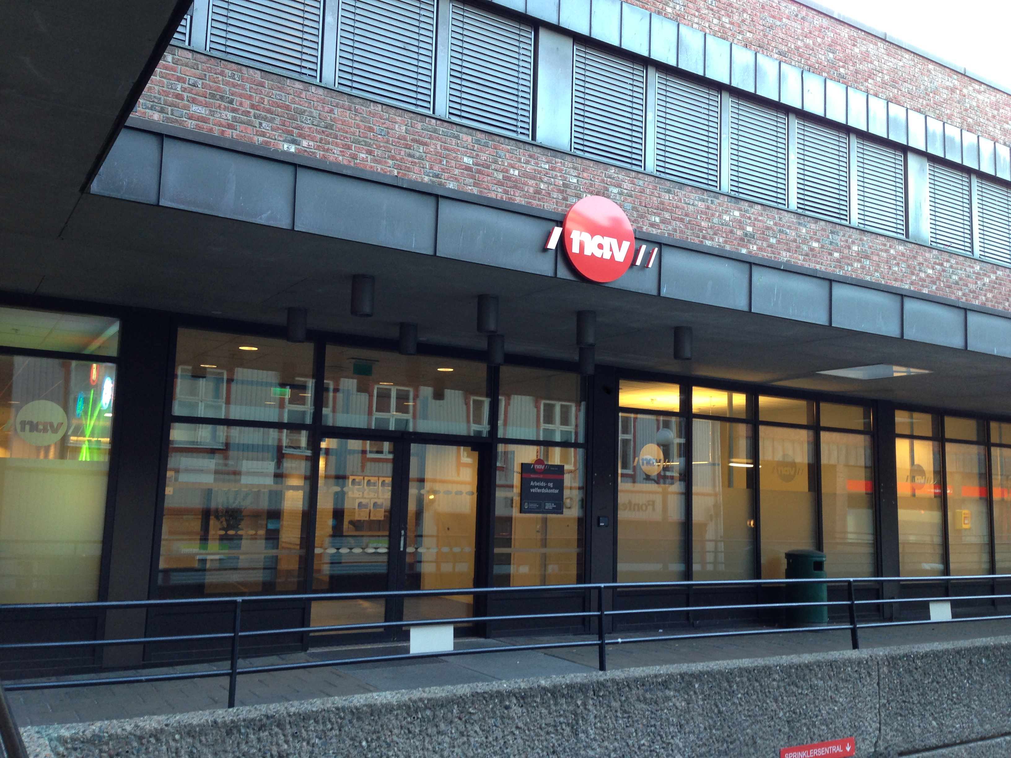 NAV Tøyen.